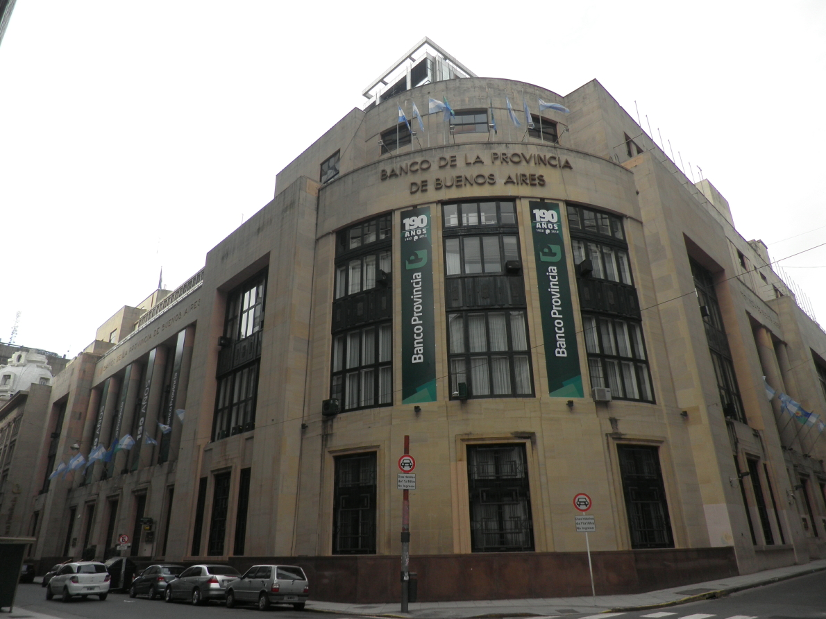 Casa Central del Banco de la Provincia de Buenos Aires